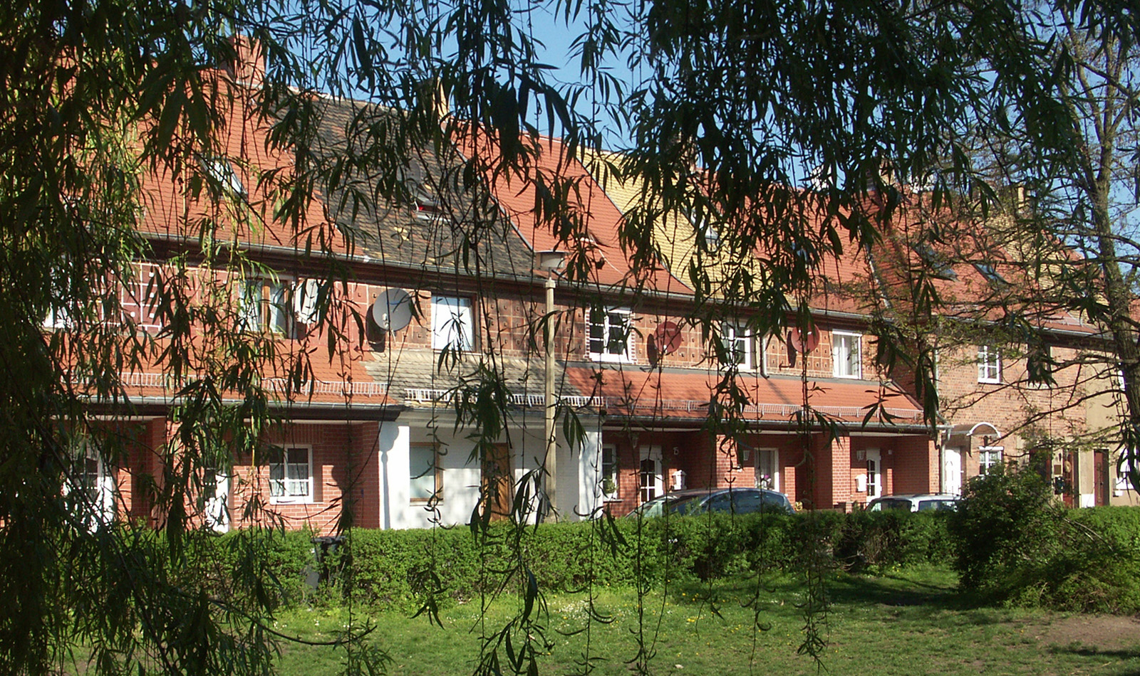 Die Weidenhofsiedlung Leipzig-Mockau (Architekt Carl James Bühring)